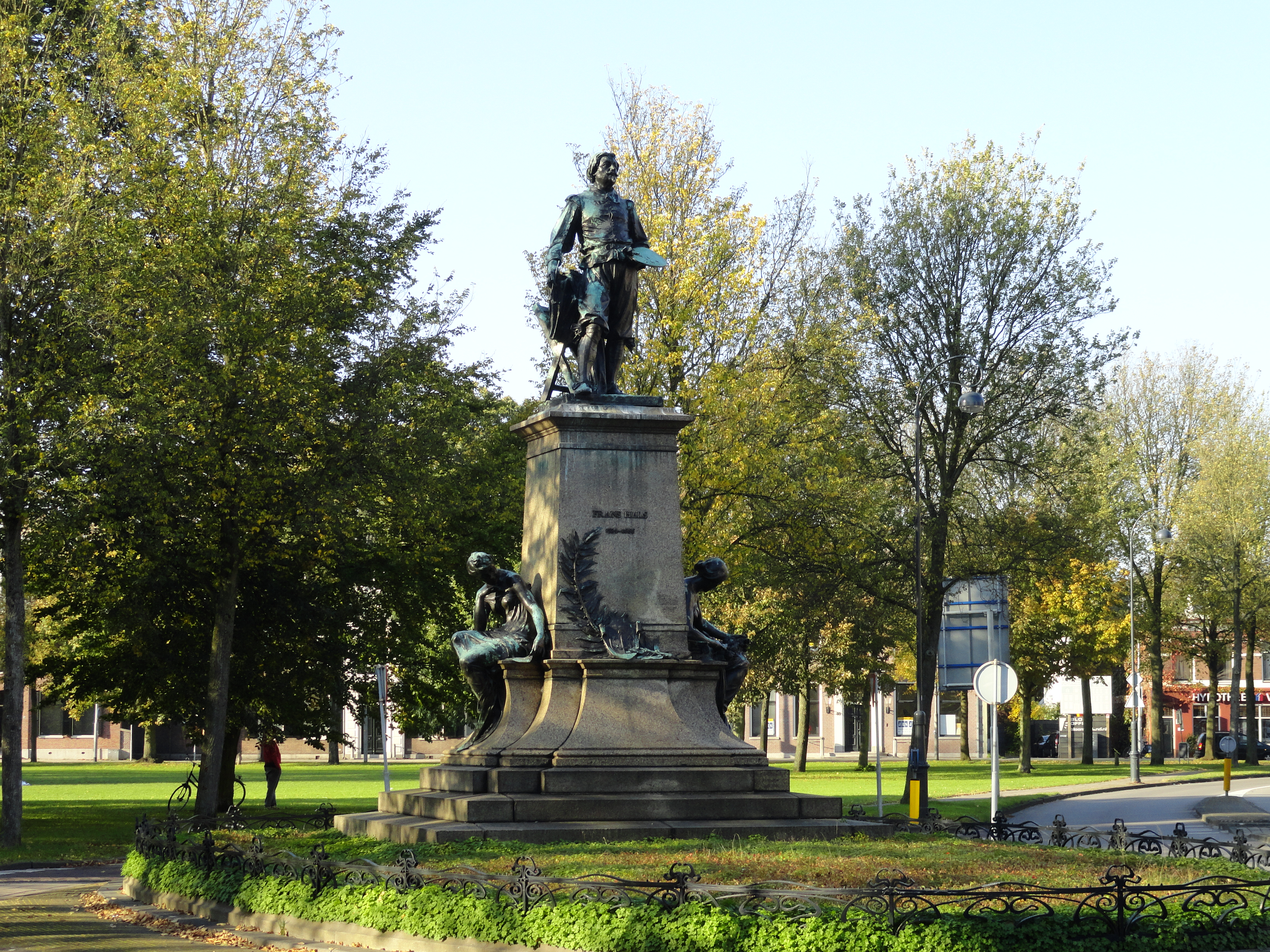 Florapark